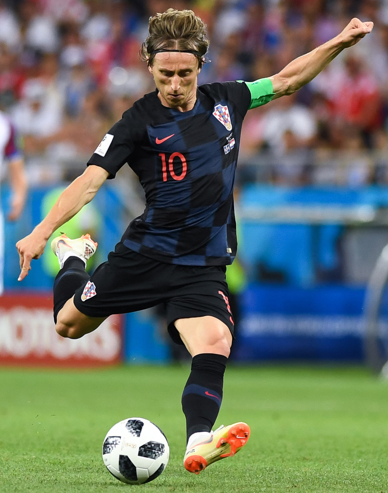 Сборная Исландии уступает Хорватии и покидает ЧМ-2018